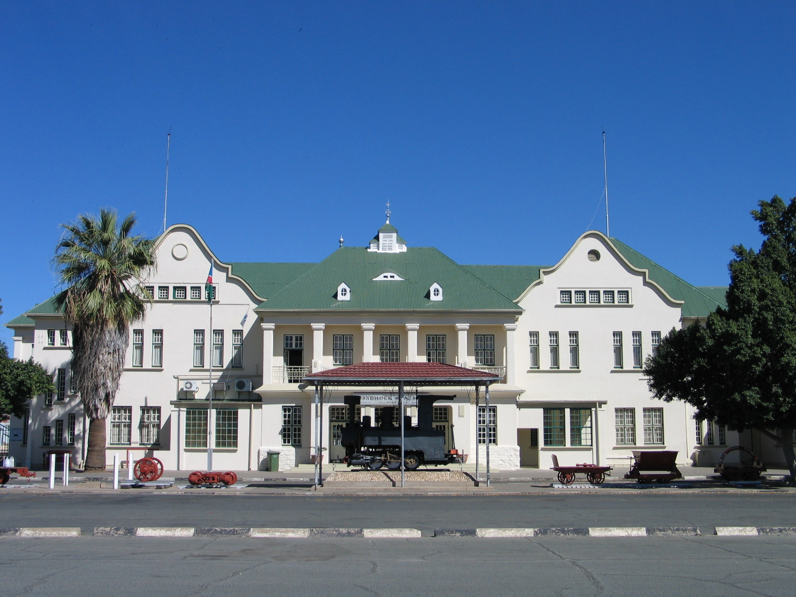 Bahnhof Windhoek, Namibia